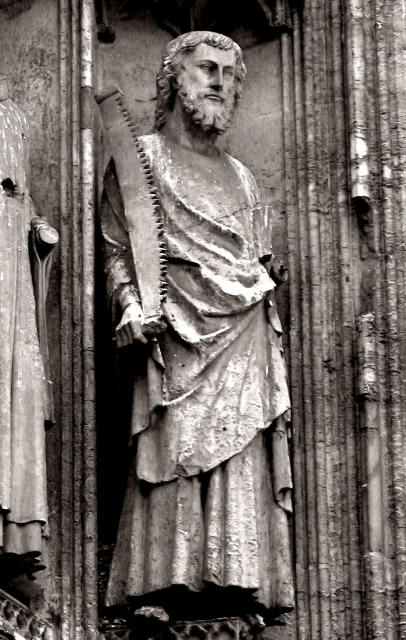 Rouen (Seine-Maritime, France) Cathédrale Notre-Dame : Saint Simon, reconnaissable à son attribut, la scie. .